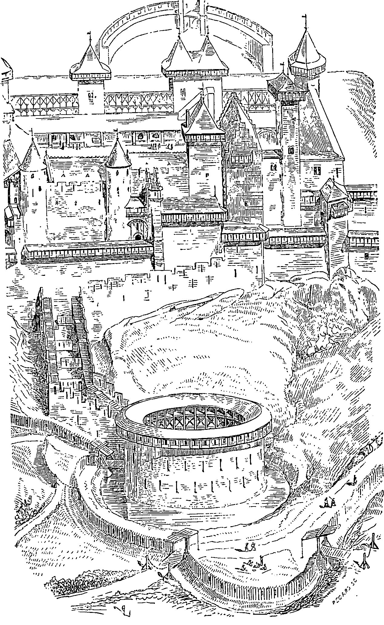 Dessin extrait de l'ouvrage La cité de Carcassonne par Eugène Viollet-le-Duc. Le dessin est intitulé : Figure N°15. Notice Gallica : Type : texte imprimé, monographie Auteur(s) : Viollet-le-Duc, Eugène-Emmanuel (1814-1879). Auteur du texte Titre(s) : La cité de Carcassonne (Aude) [Texte imprimé] / par Viollet Le Duc Publication : Paris : Librairie des imprimeries réunies, 1888 Description matérielle : 85 p. : ill. ; in-8 Sujet(s) : Carcassonne (Aude) -- Cité -- Histoire Notice n° : FRBNF36570974